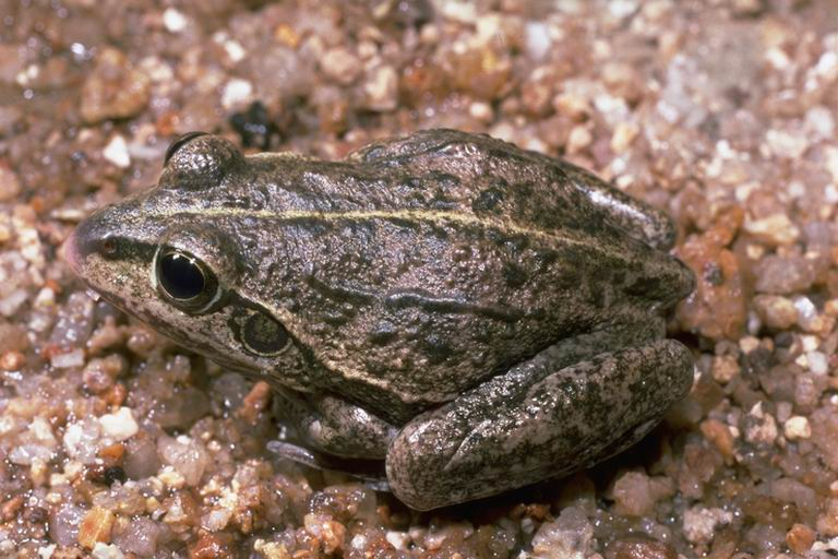 Cyclorana alboguttata